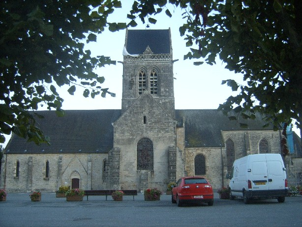 Sainte-Mère-Église Church. Parachute and mannequin